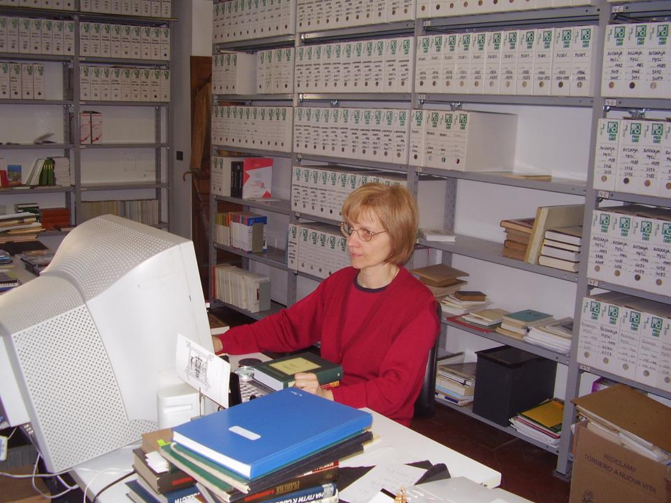 Библиотека центра "Христианская Россия" в Сериате